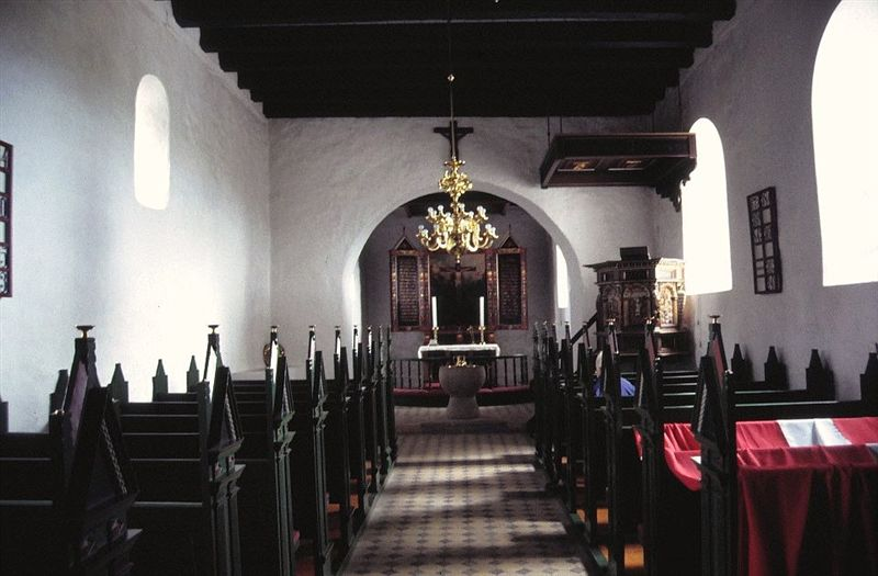 Hallund Kirke i Danmark. Skibet set mod øst